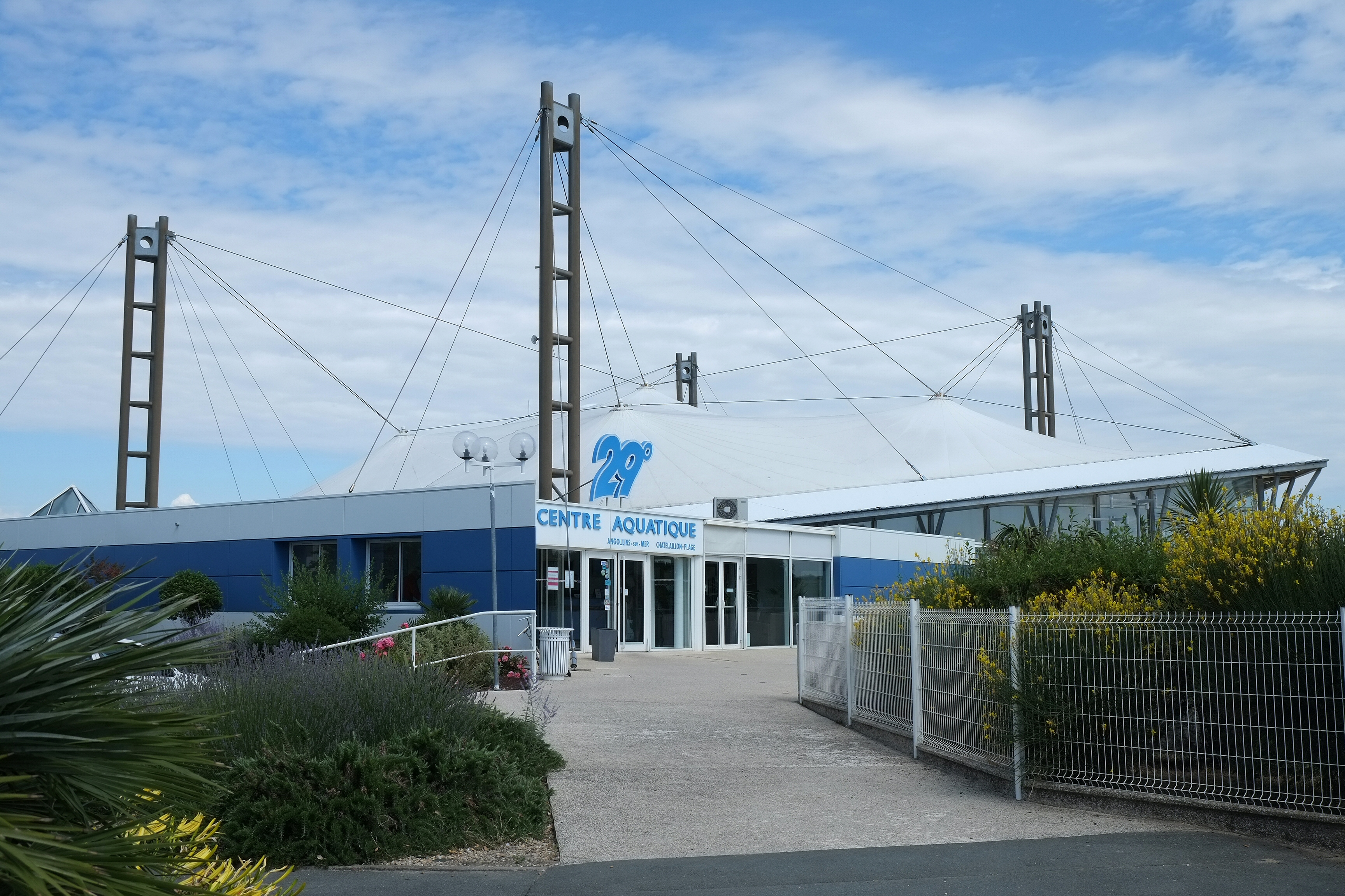 Centre Aquatique Châtelaillon-Plage Charente-Maritime France